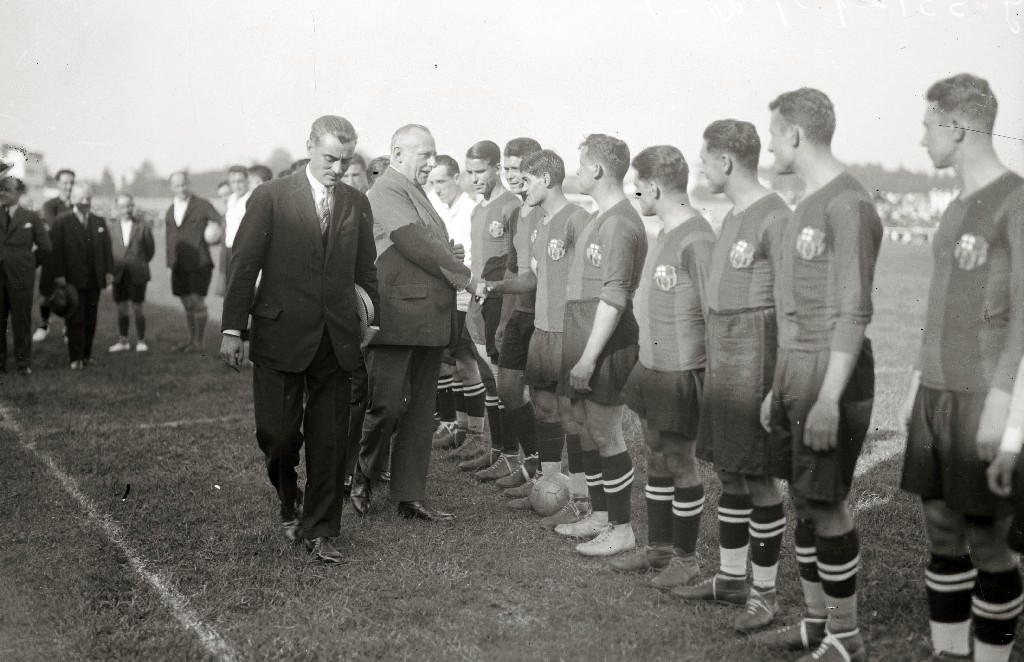 Título original: Escenas de la inauguración del Estadio Gal en la localidad de Irun (5/14) Localización: Irún (Guipúzcoa)